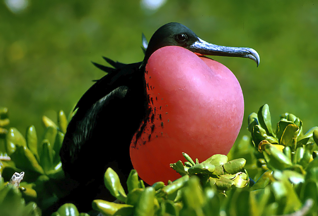 Magnificent Frigate Bird (Fregata magnificens)